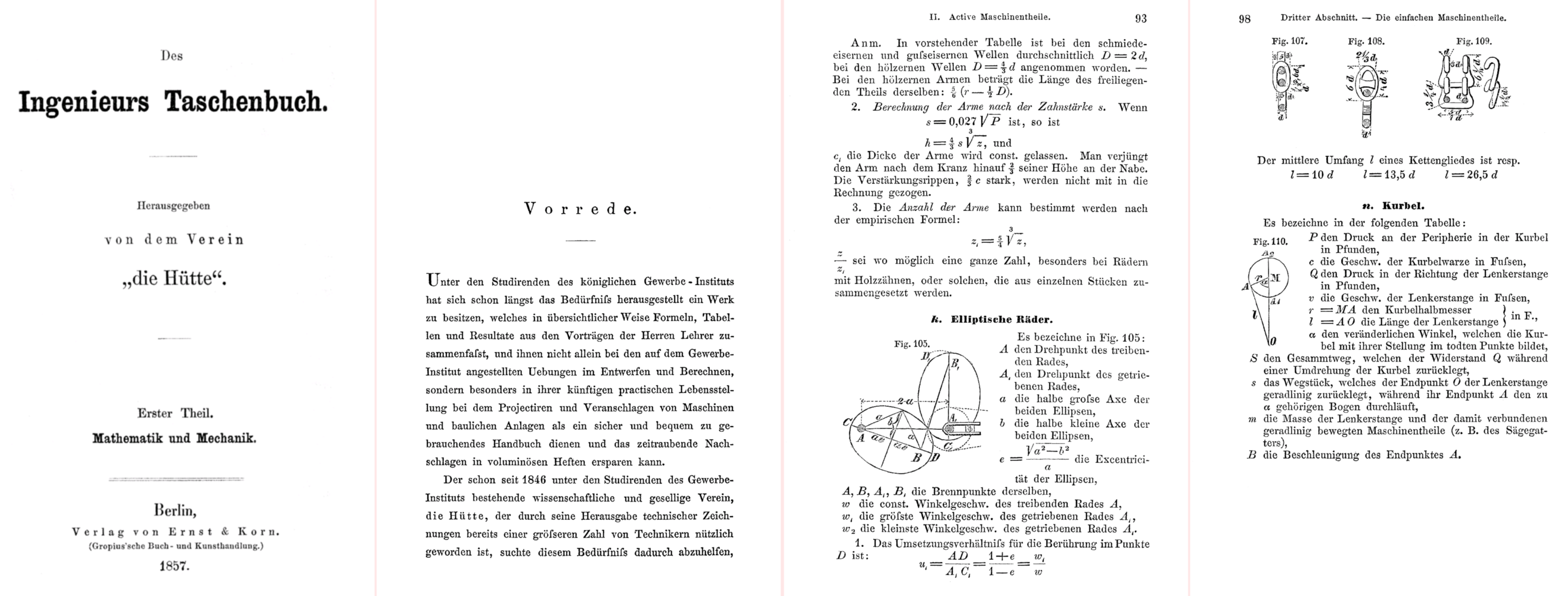 Leseprobe/Auszug der ersten Ausgabe des Buches „Hütte – Des Ingenieurs Taschenbuch“ von 1857, erschienen mit einer Auflage von 1.000 Stück Excerpt of the 1st edition 1857 of „Hütte – Des Ingenieurs Taschenbuch“